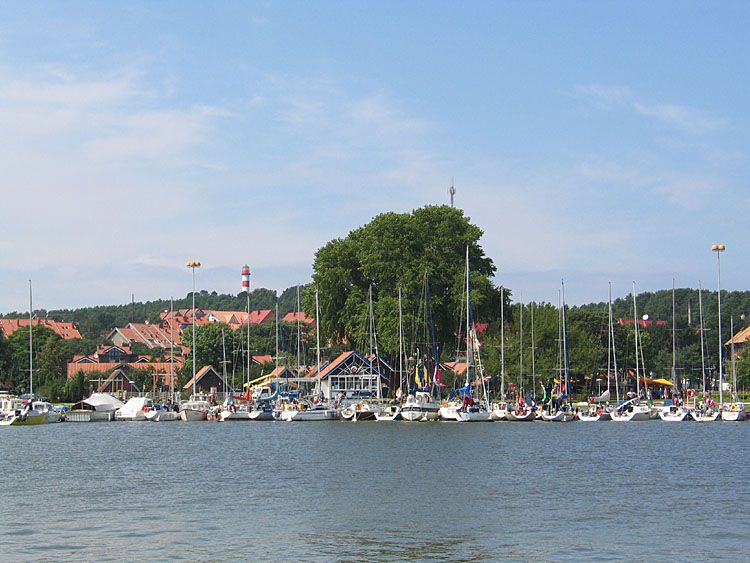 Blick auf Nida von der Hafenmole aus (Original text: Blick auf Nida von der Hafenmole aus)